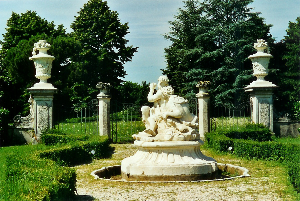 Villa Cordellina Lombardi-garden